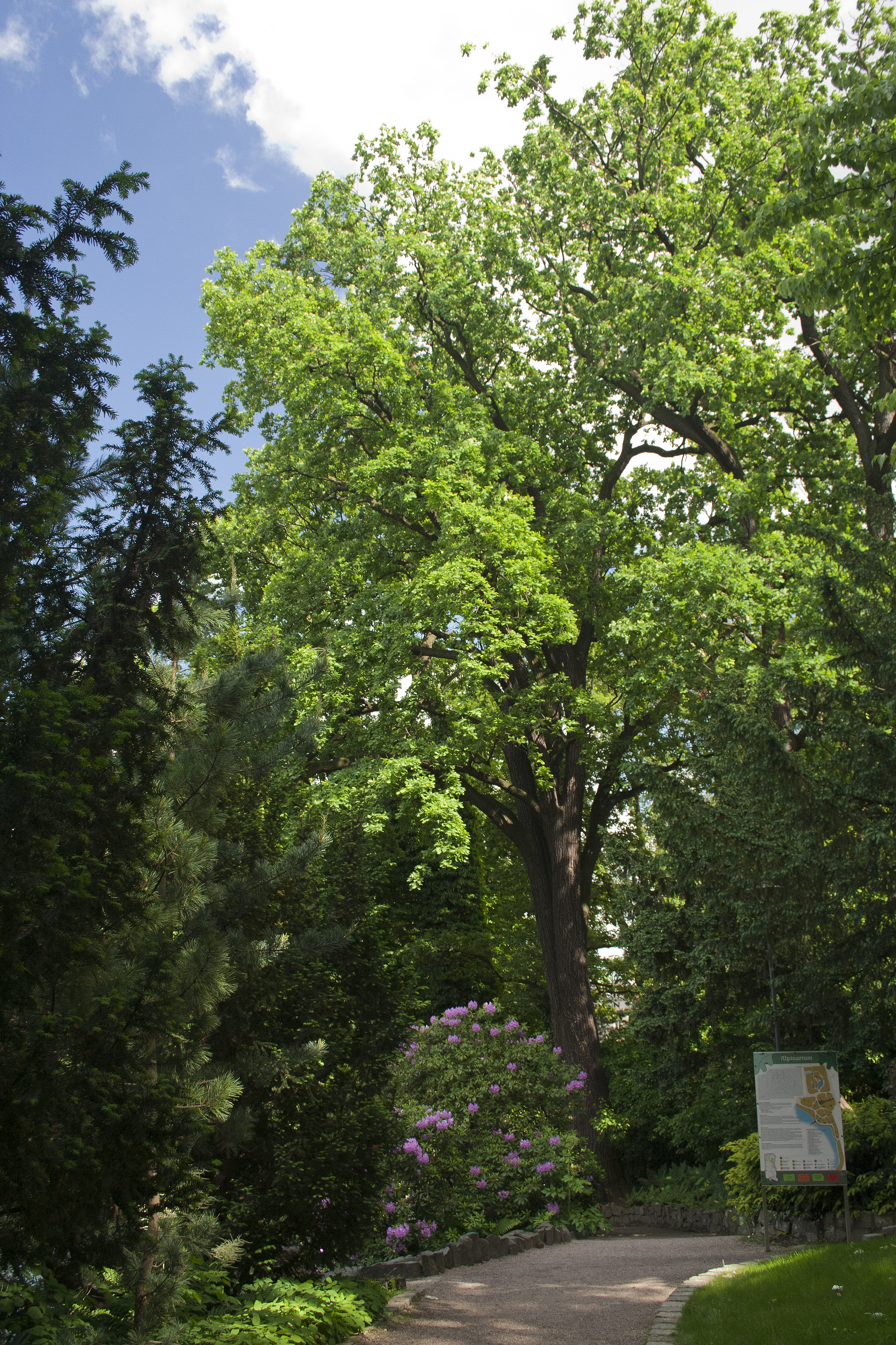 Grupa drzew dąb szypułkowy Quercus robur w Ogrodzie Botanicznym we Wrocławiu